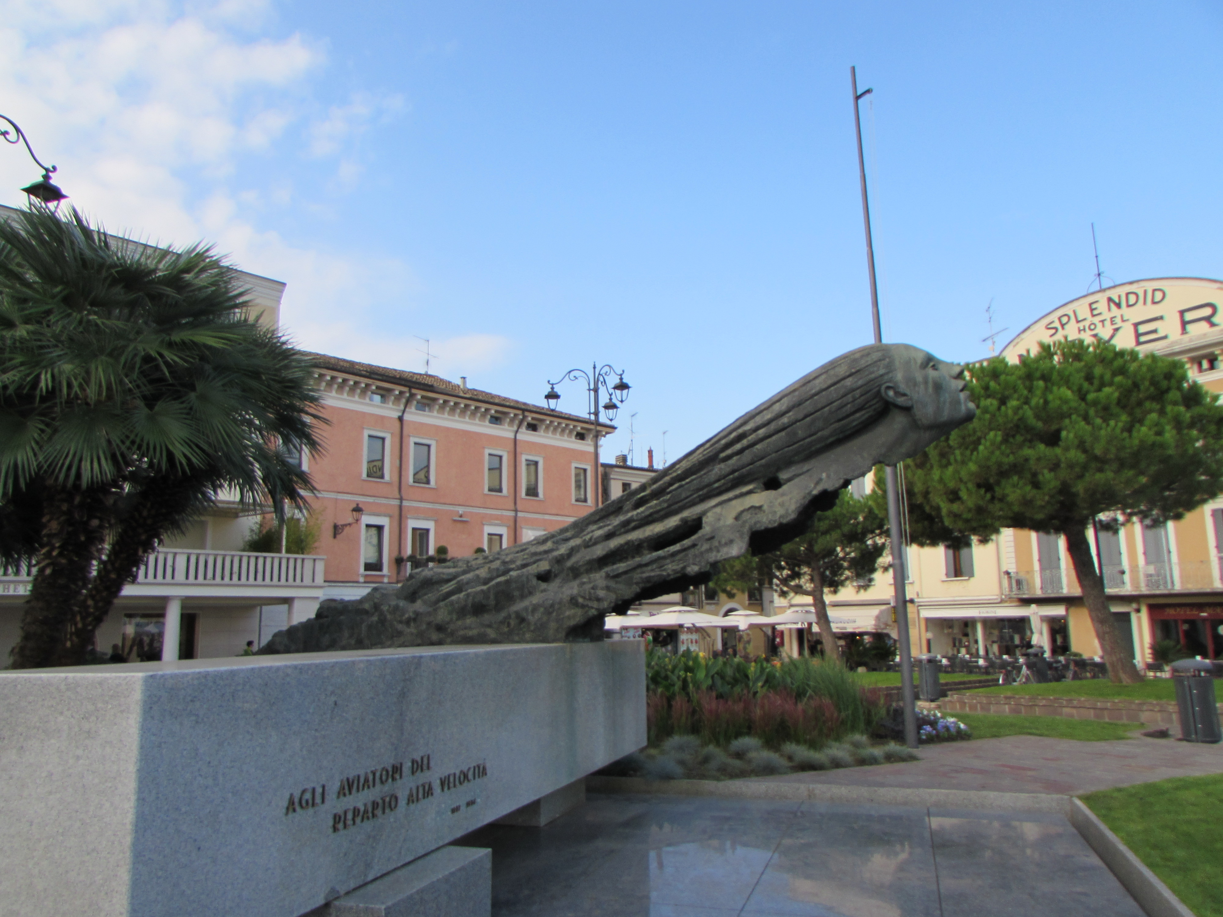 Monumento Scuola Aviazione